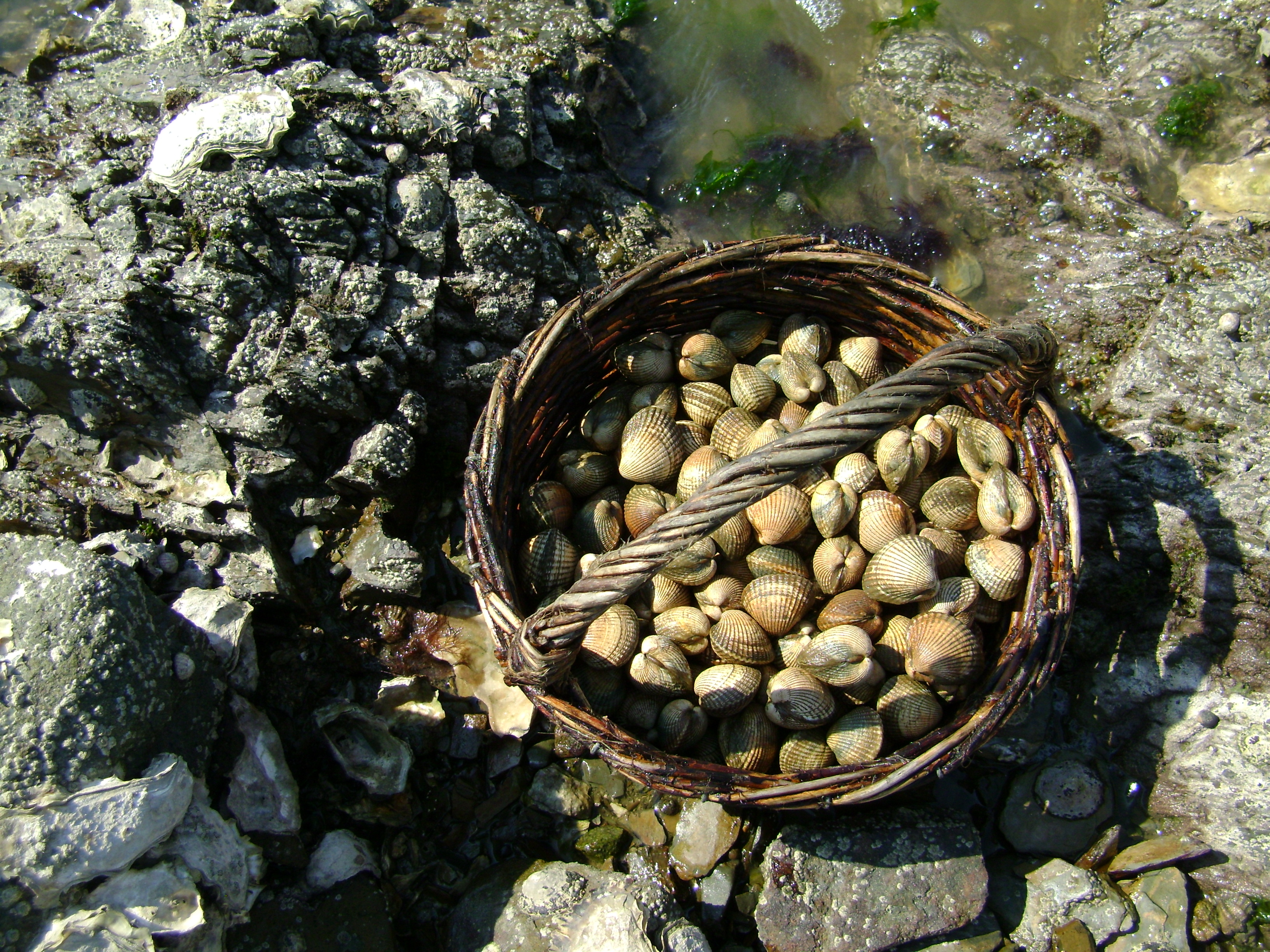 Logonna-Daoulas, pêche à pied